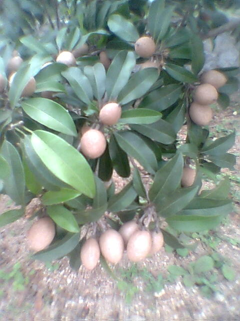 சப்போட்டா பழம்